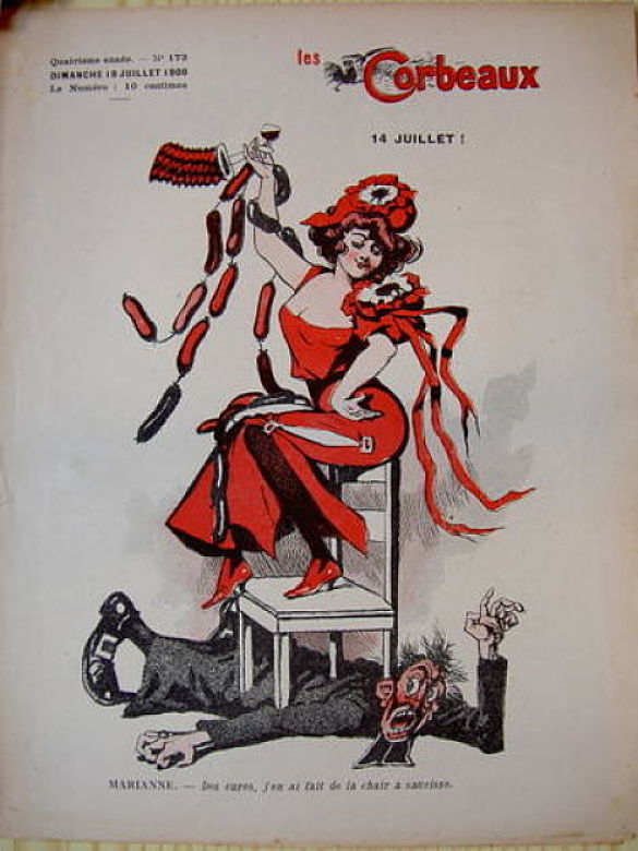 Les Corbeaux (1904-1909) est une revue satirique anticléricale fondée par Didier Dubucq.